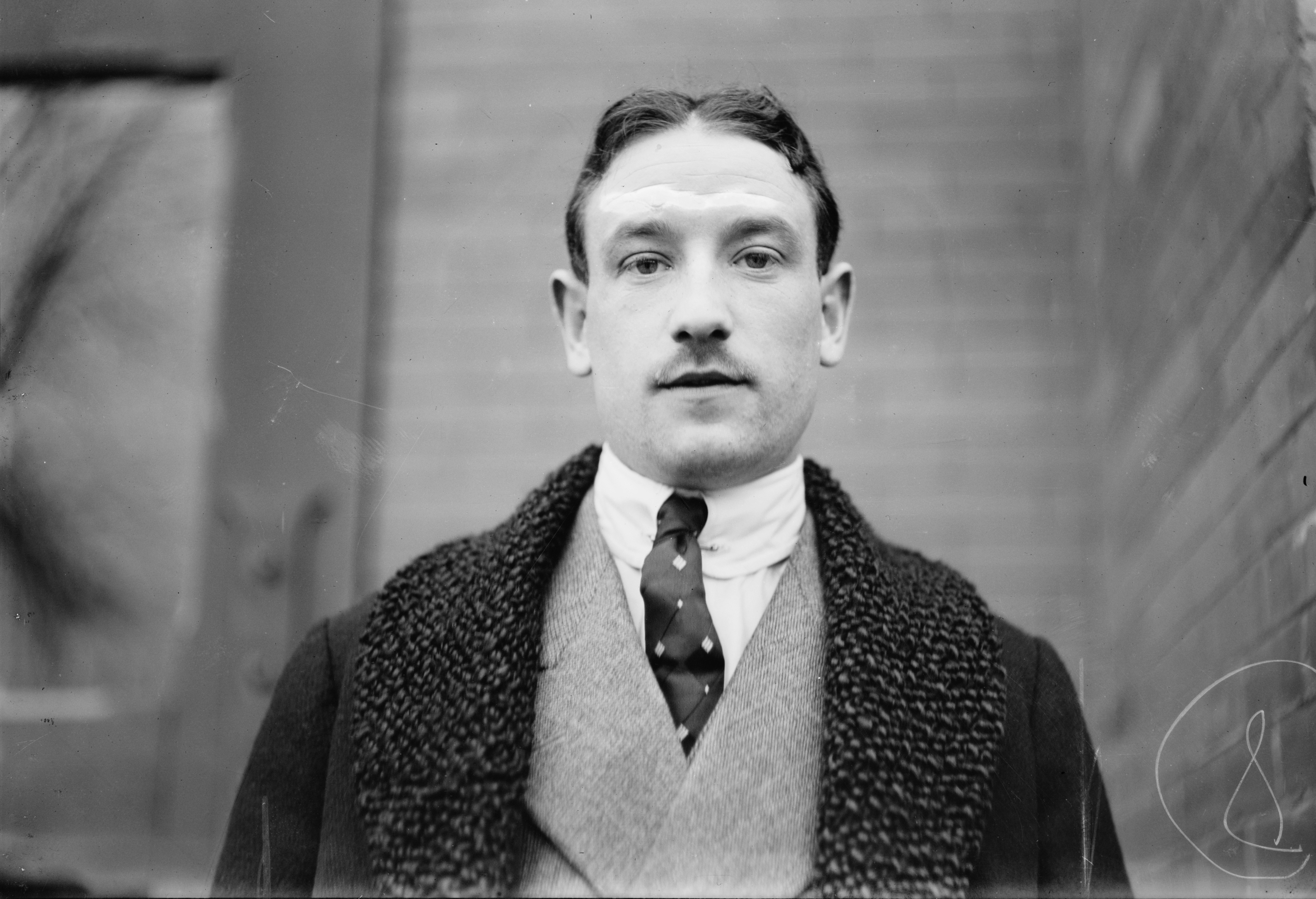 André Perchicot (1888 - 1950), French cyclist